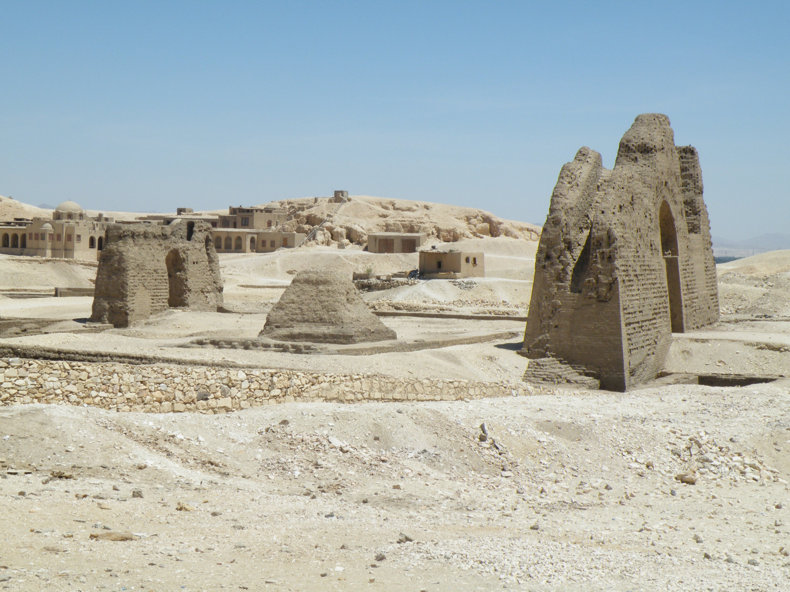 Montuemhat sírtemploma (Luxor, Egyiptom)